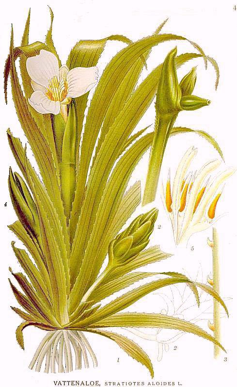 Stratiotes aloides L. Original Description Vattenaloe, Stratiotes aloides L.